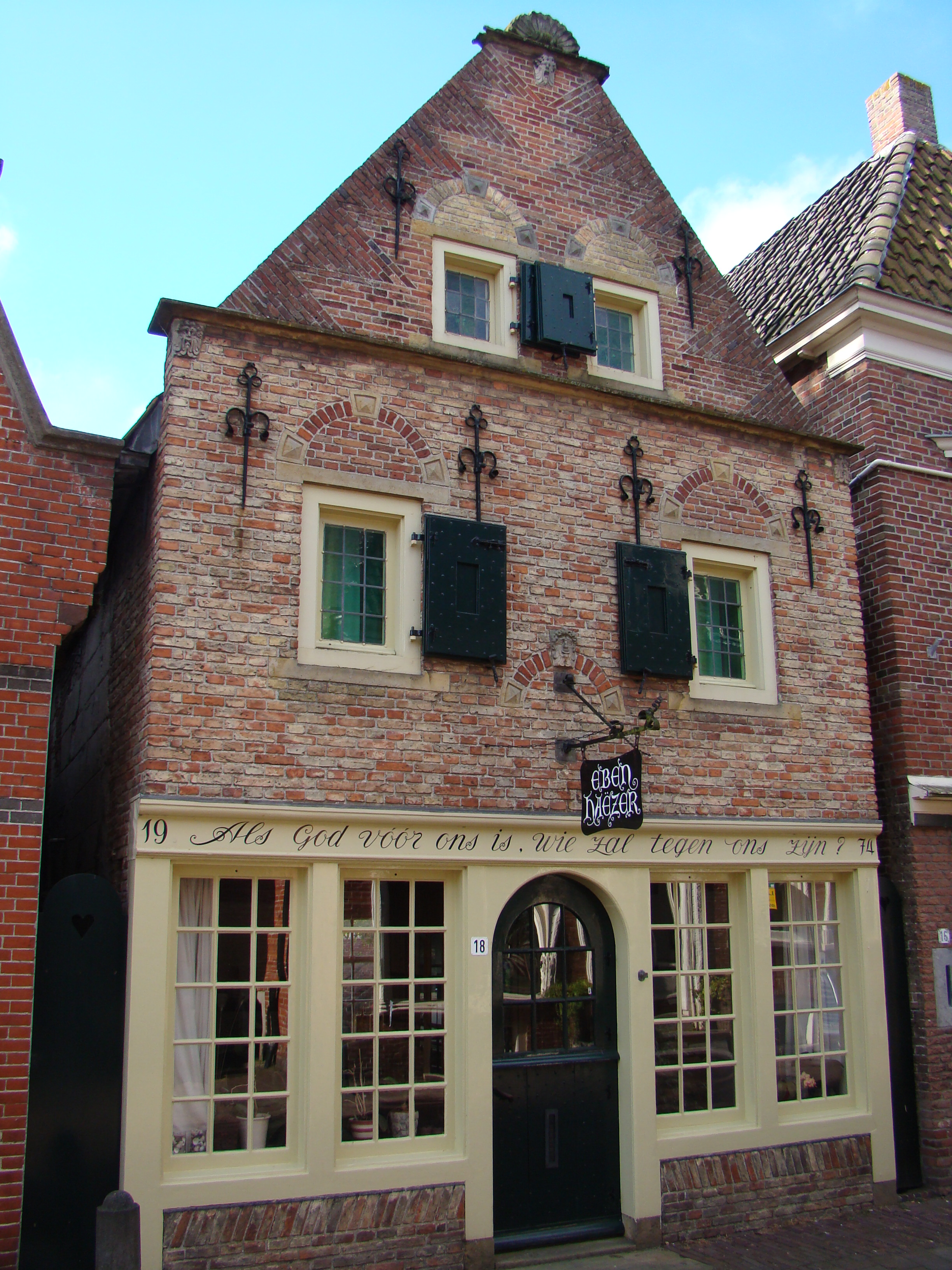 Impressions of Appingedam, Netherlands Solwerderstraat 18, Appingedam